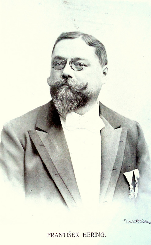 František Adolf Hering